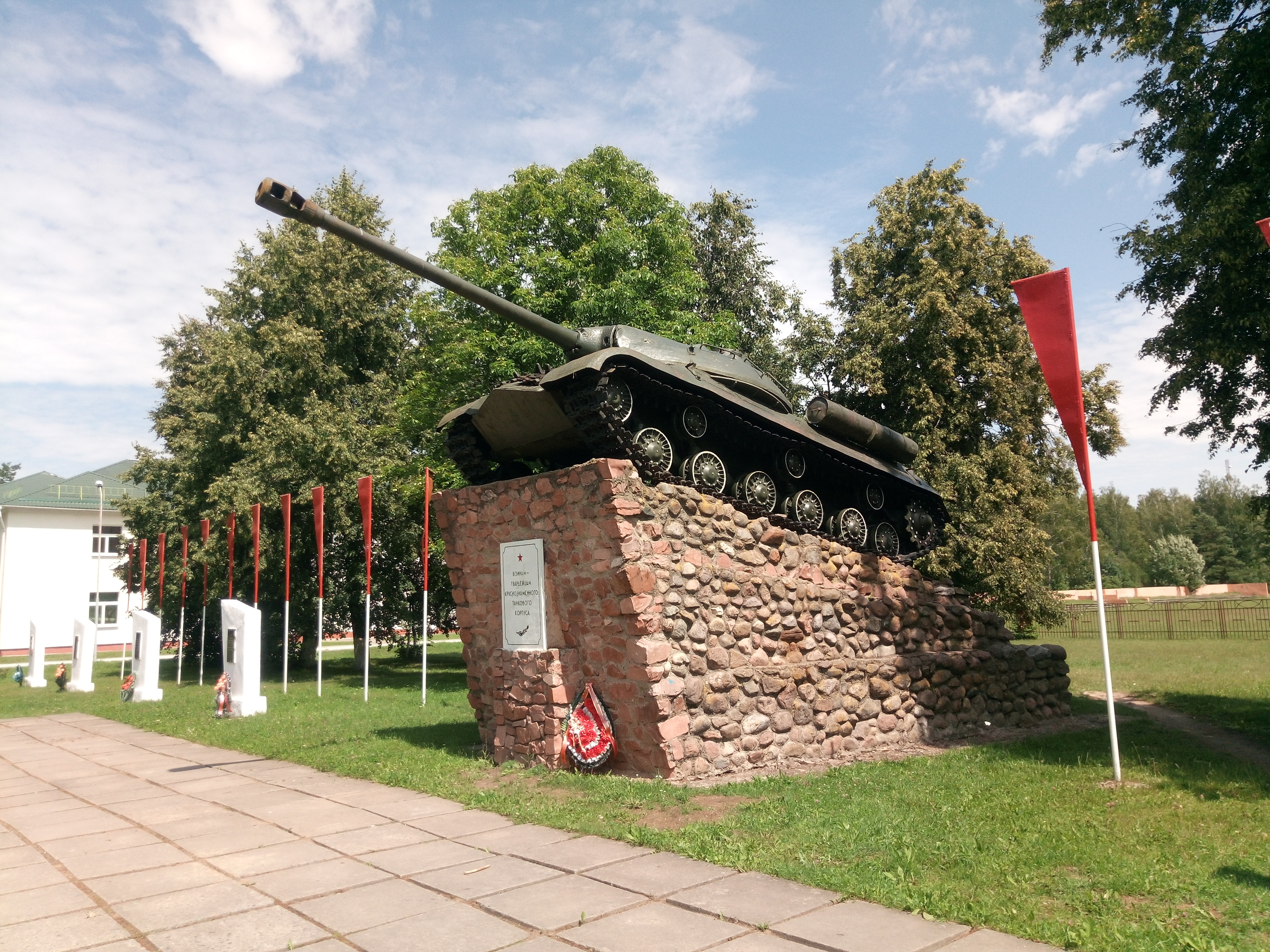 Танк ІС-3